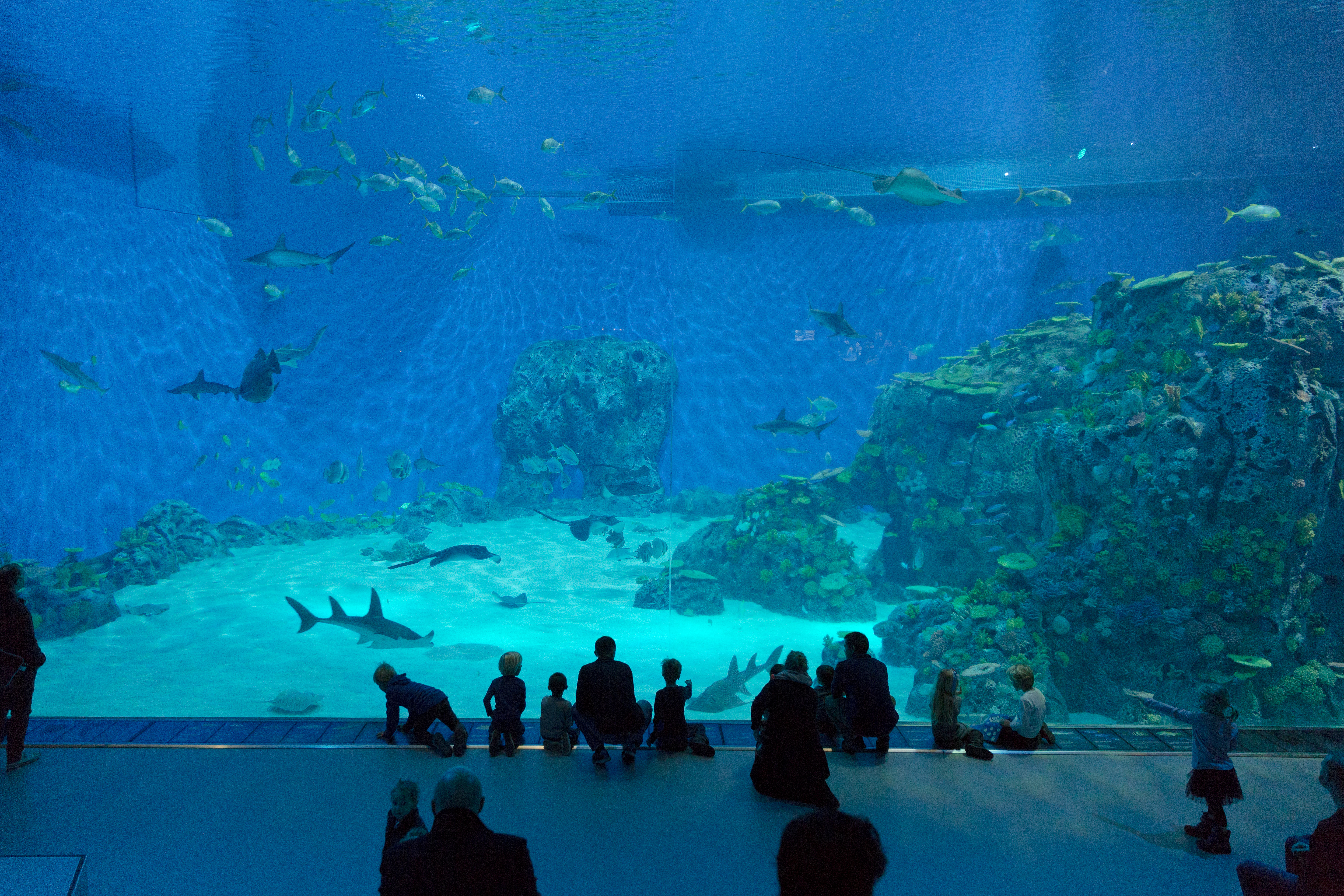 Ocean tanken i Den blå planet